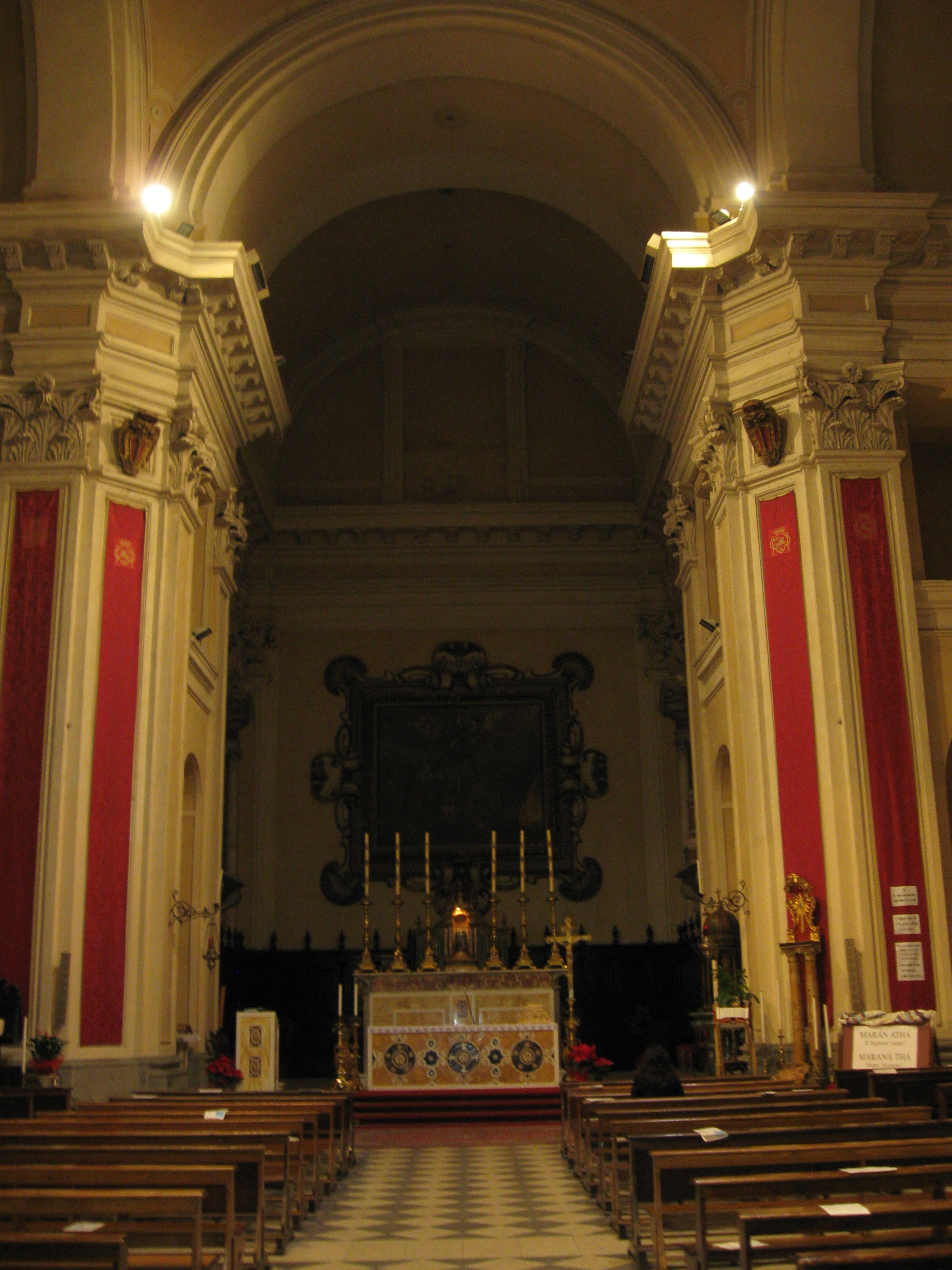 L'interno della basilica di San Barnaba a Marino (RM) nel dicembre 2008